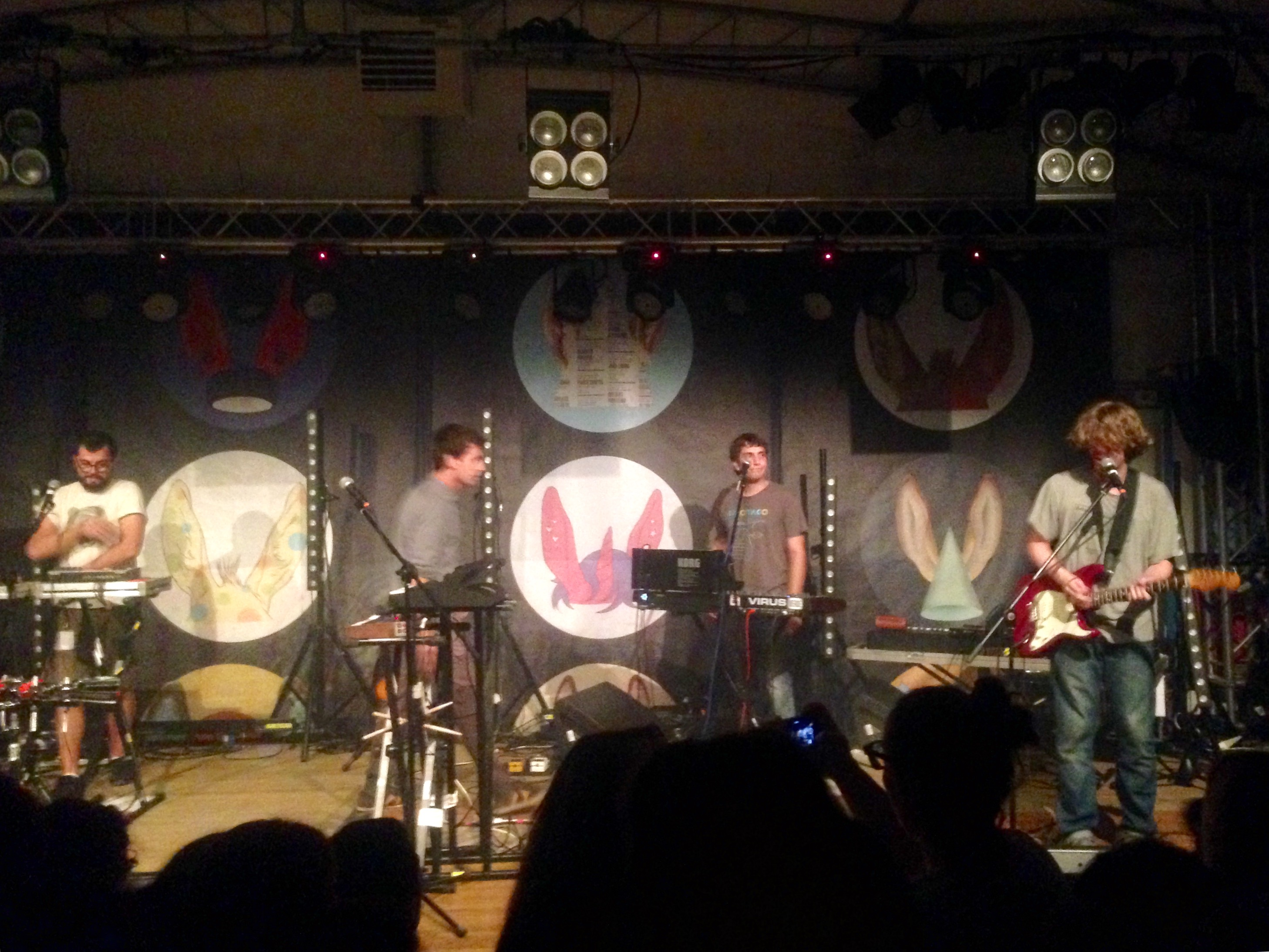 Lo Stato Sociale in concerto a Varese nel 2014 per il tour de L'Italia peggiore. Da sinistra a destra: Bebo, Albi, Carota e Lodo